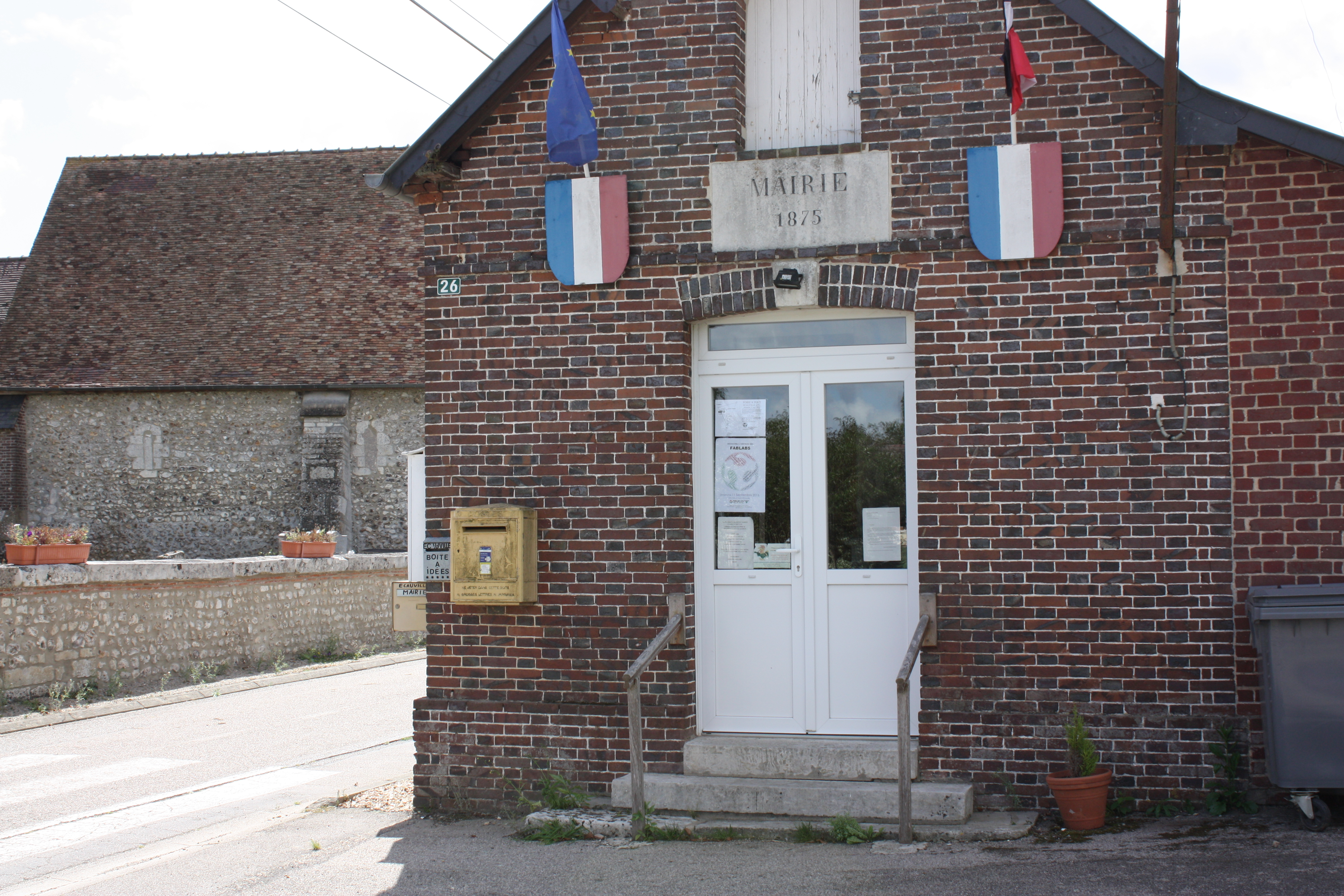 Ecauville, mairie et église